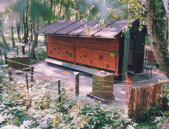 Bienenhaus aus Holz im Wald, davor Magazinbeuten